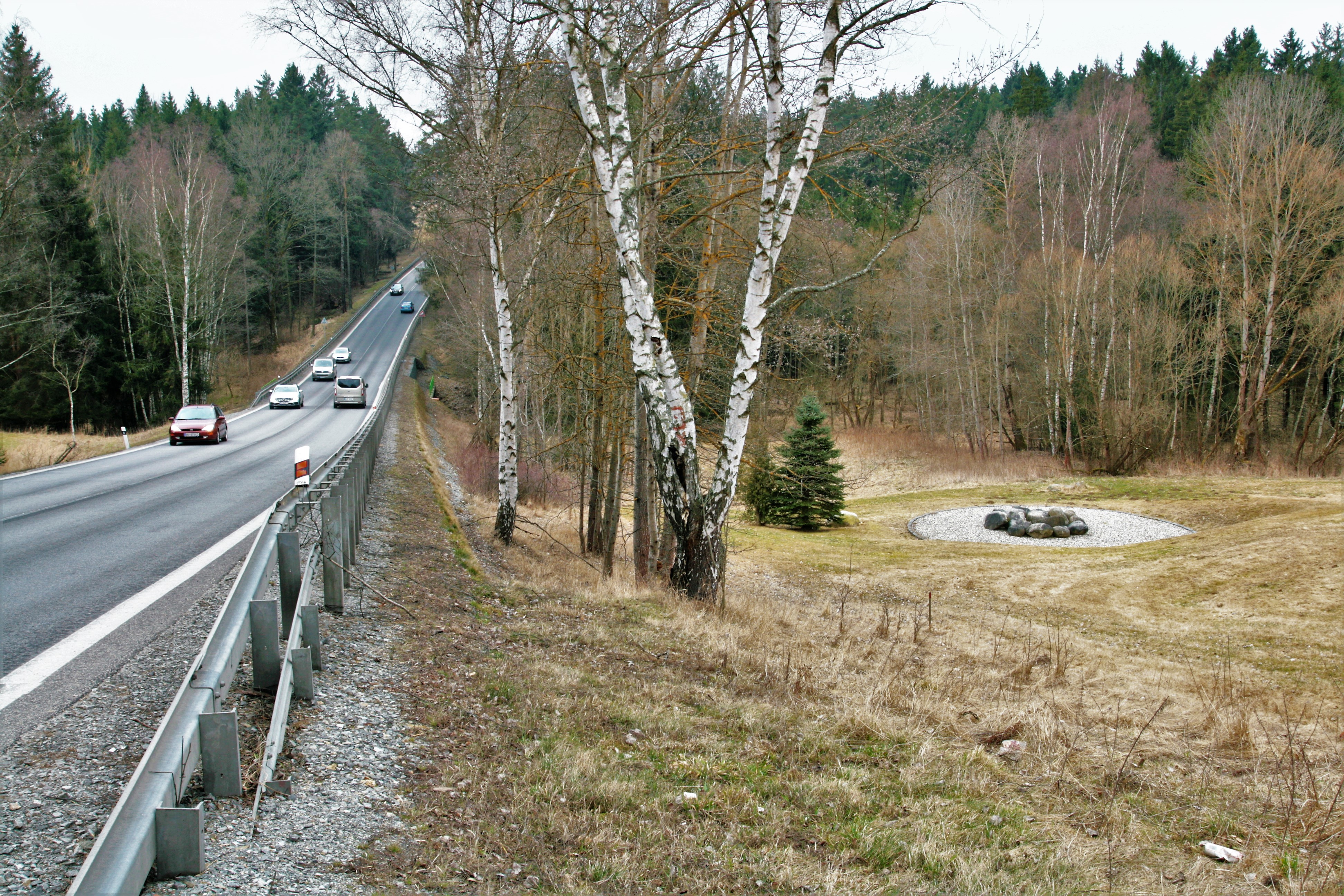 Osada Nažidla, součást vesnice Suchdol, části obce Bujanov. Pomník tragické nehody autobusu z 8. března 2003 při silnici E55.